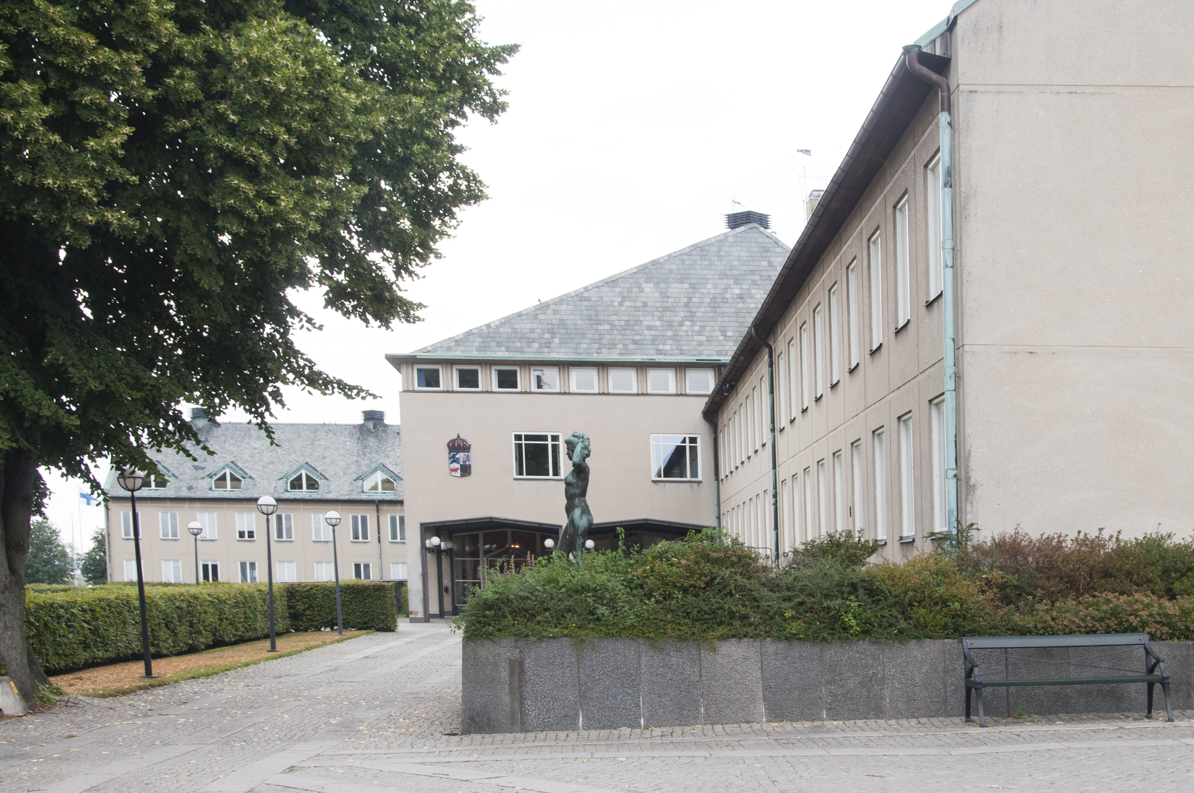 Länstyrelsen i Mariestad 2014. Landsstatshuset byggt 1947. Arkitekt Klas Anshelm